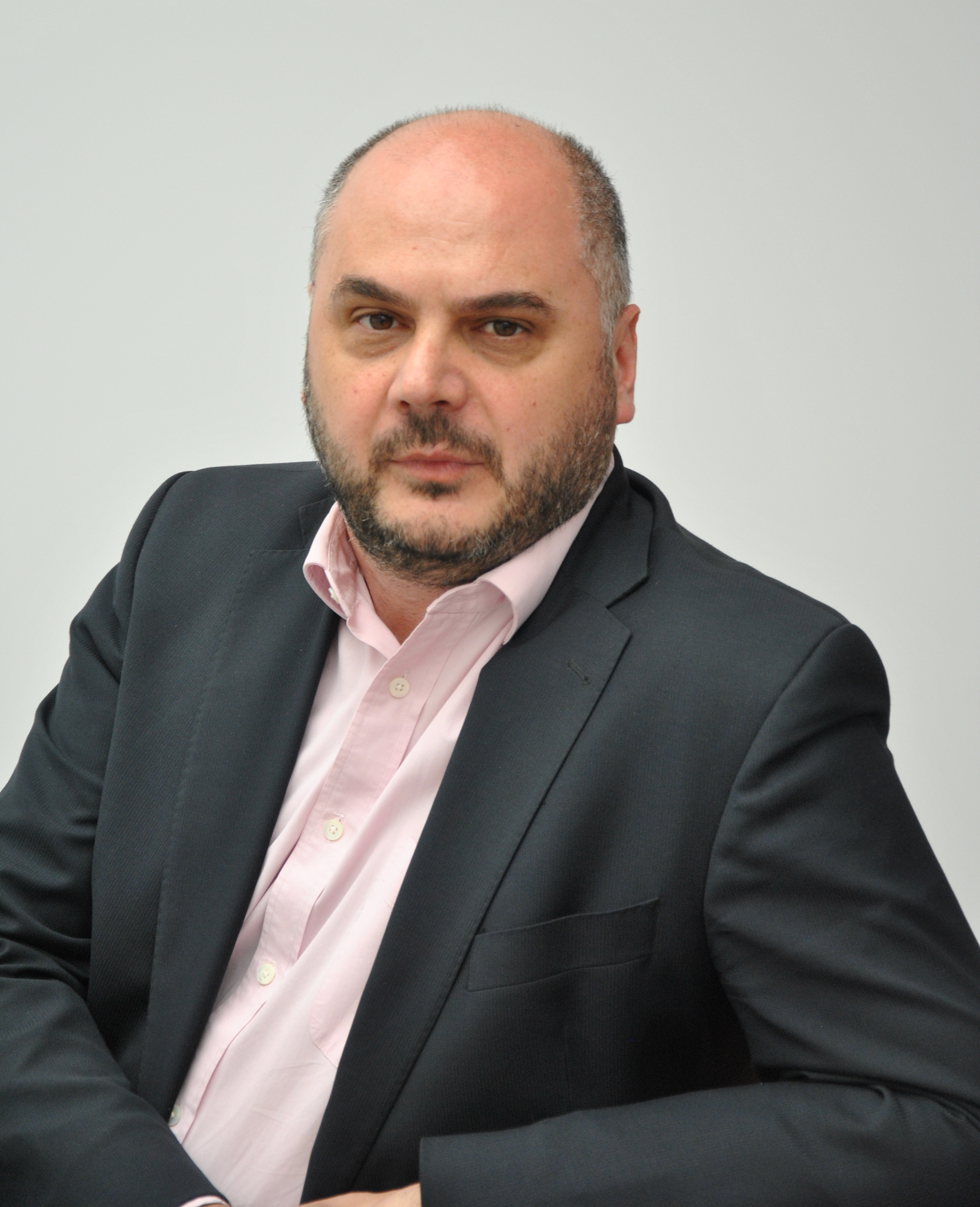 Portrait du ministre bruxellois Christos Doulkeridis